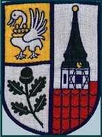 Kirche Hamburg-Bergstedt